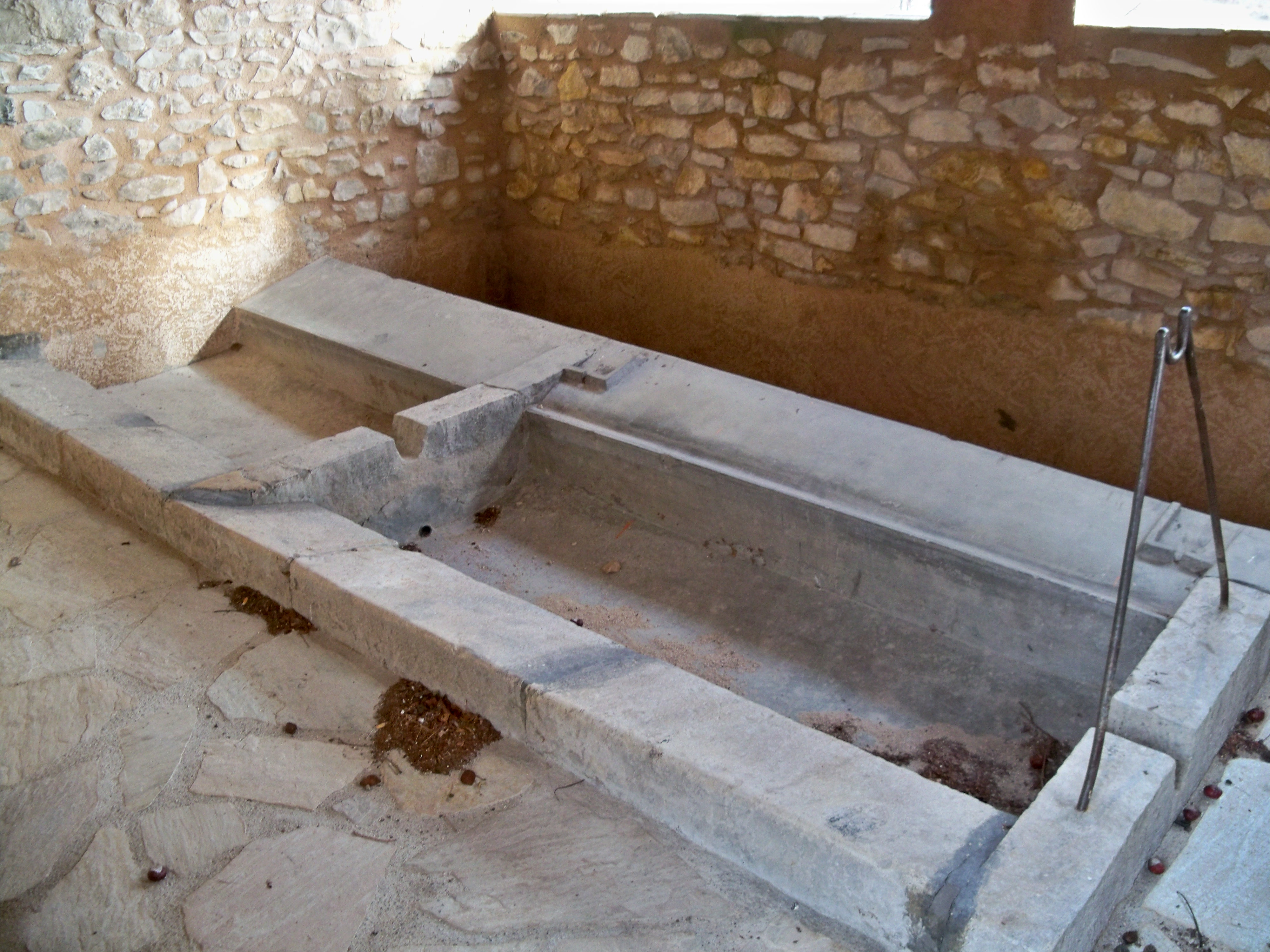 Lavoir à l'Hospitalet (04)